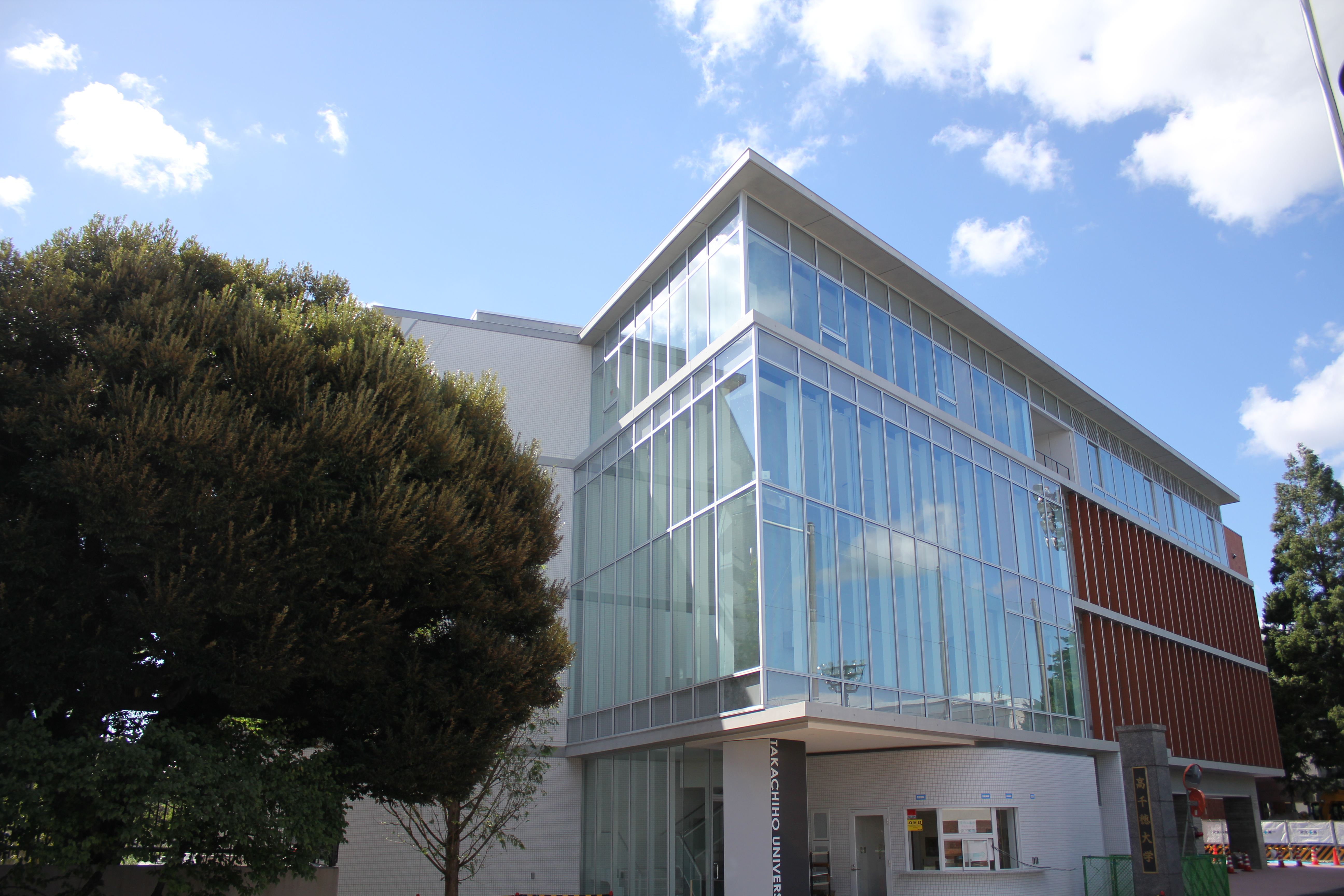 高千穂大学 新1号館